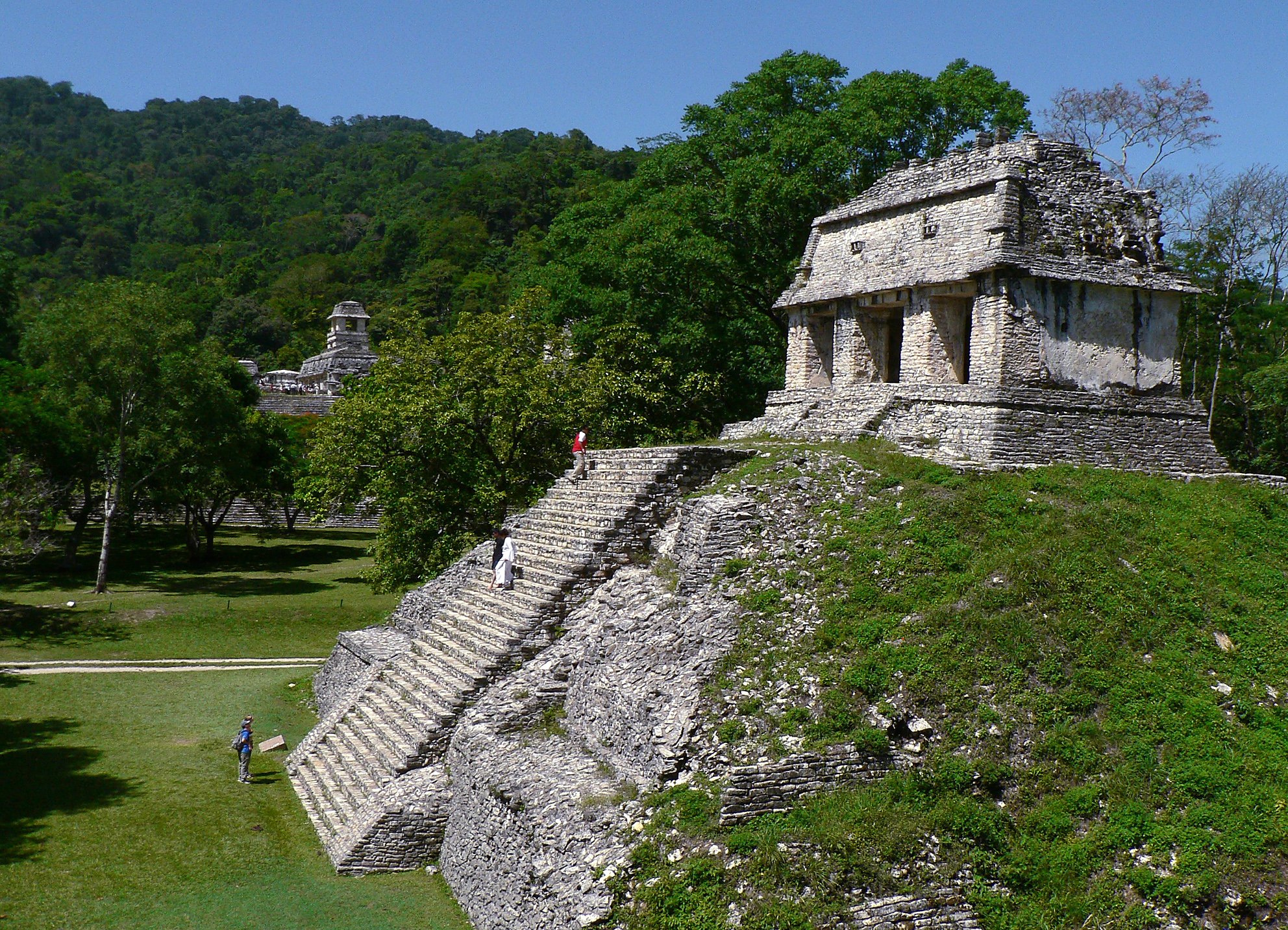 Fotografija templja Preštevanja. Posneto v Mehiki, v majevskem mestu Palemque